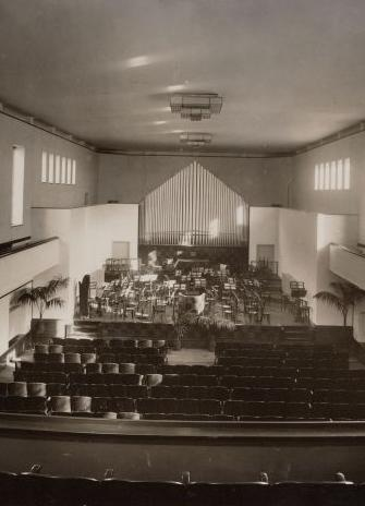 Het oude Conservatorium van Amsterdam aan de Bachstraat